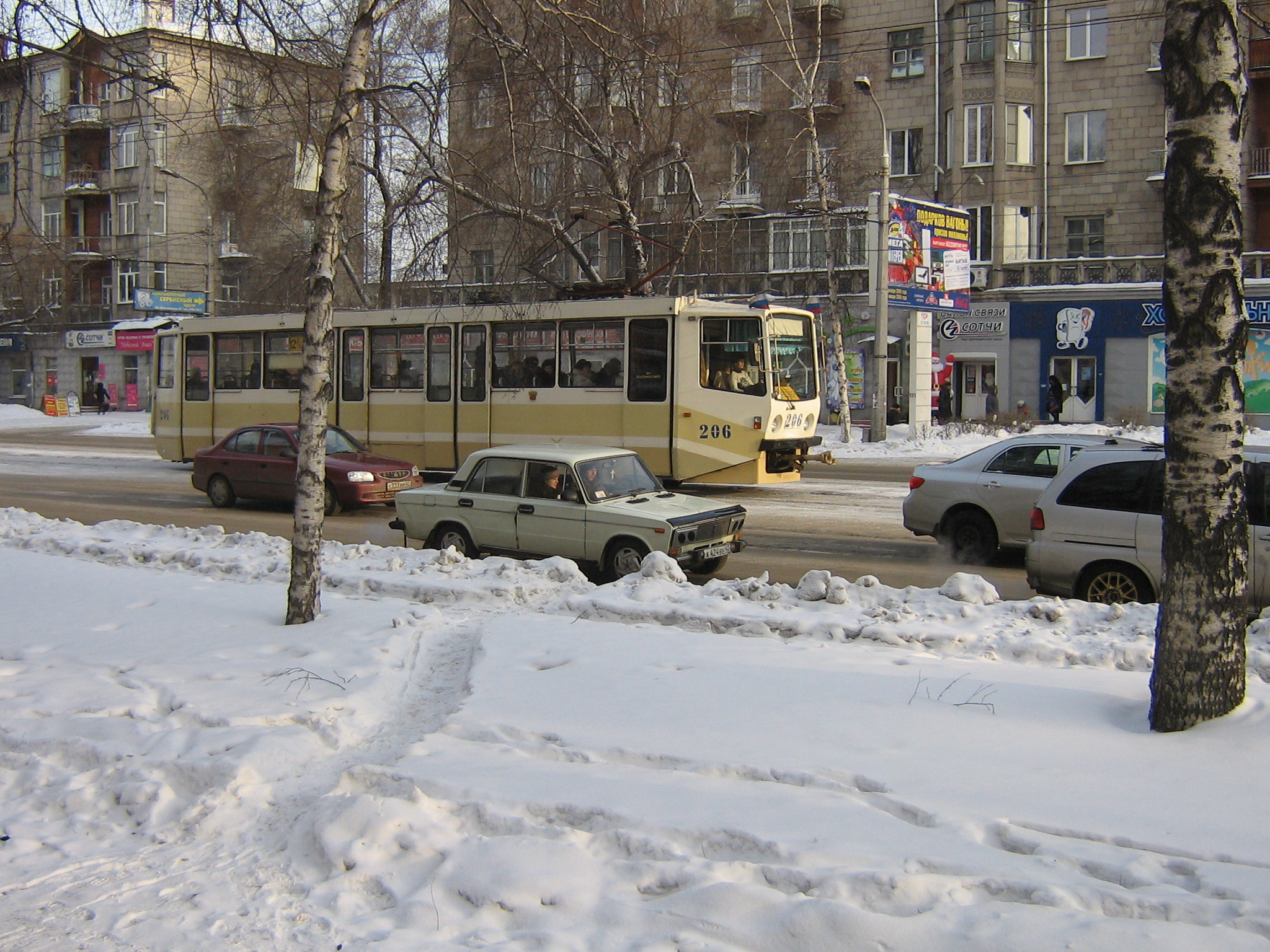 Tram municipale in servizio a Novokuzneck (Russia): vettura n.206, linea 12.